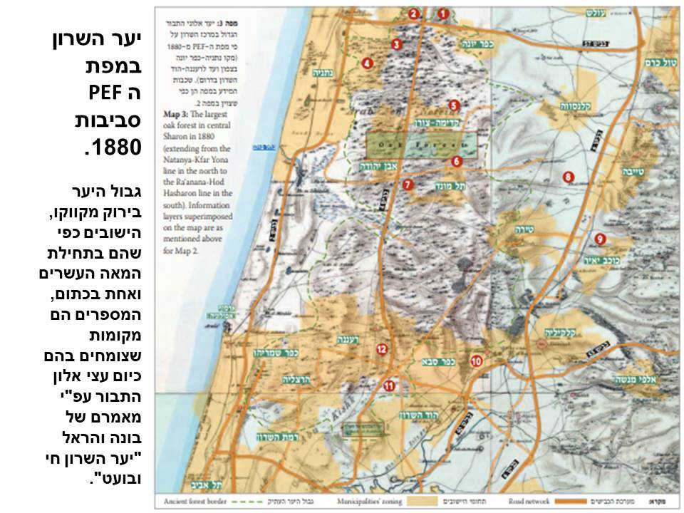 גבולות יער השרון עפ"י מאמרם של בונה והראל